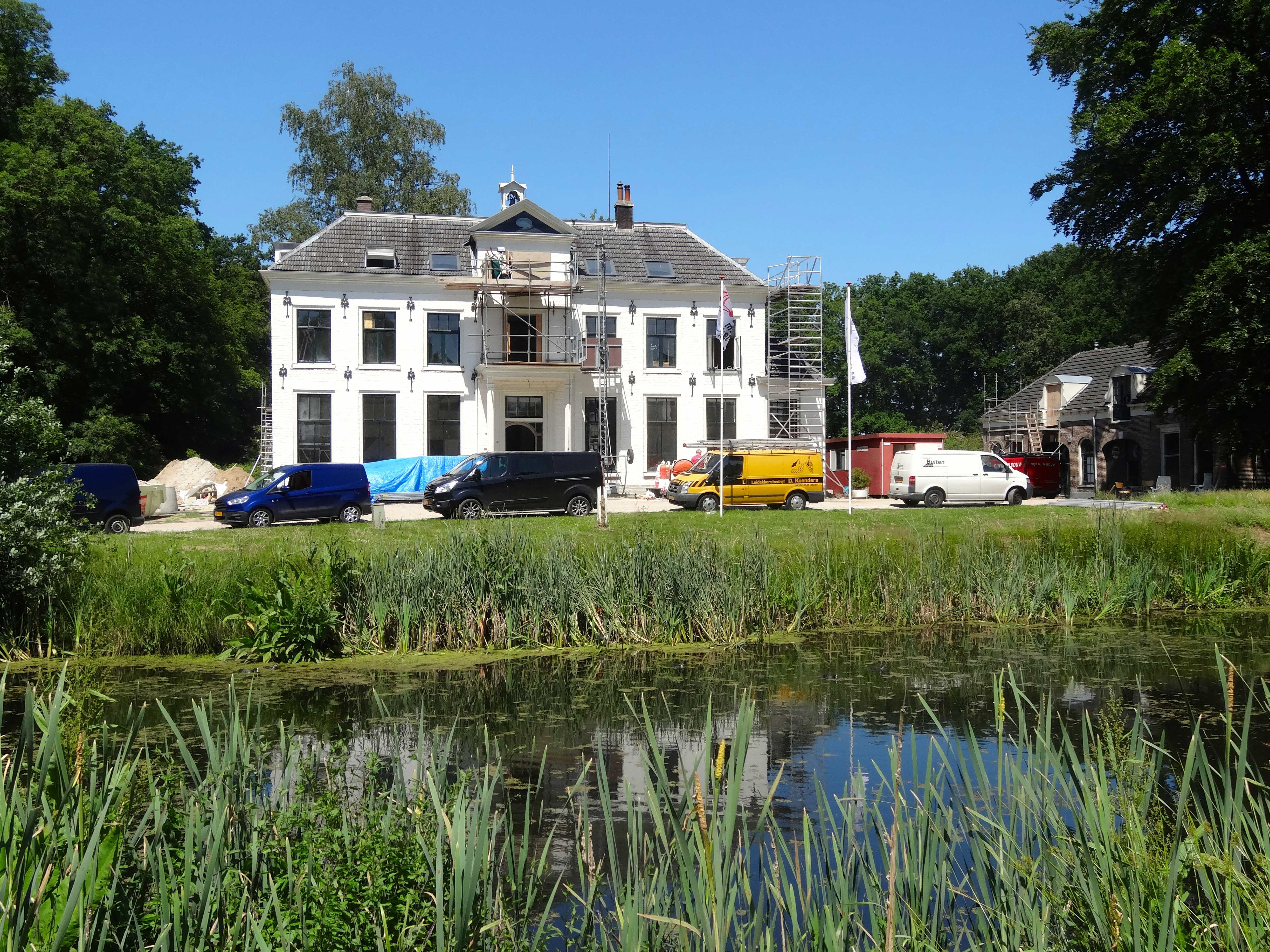 Het Hunderen nabij Twello (restauratiewerkzaamheden)